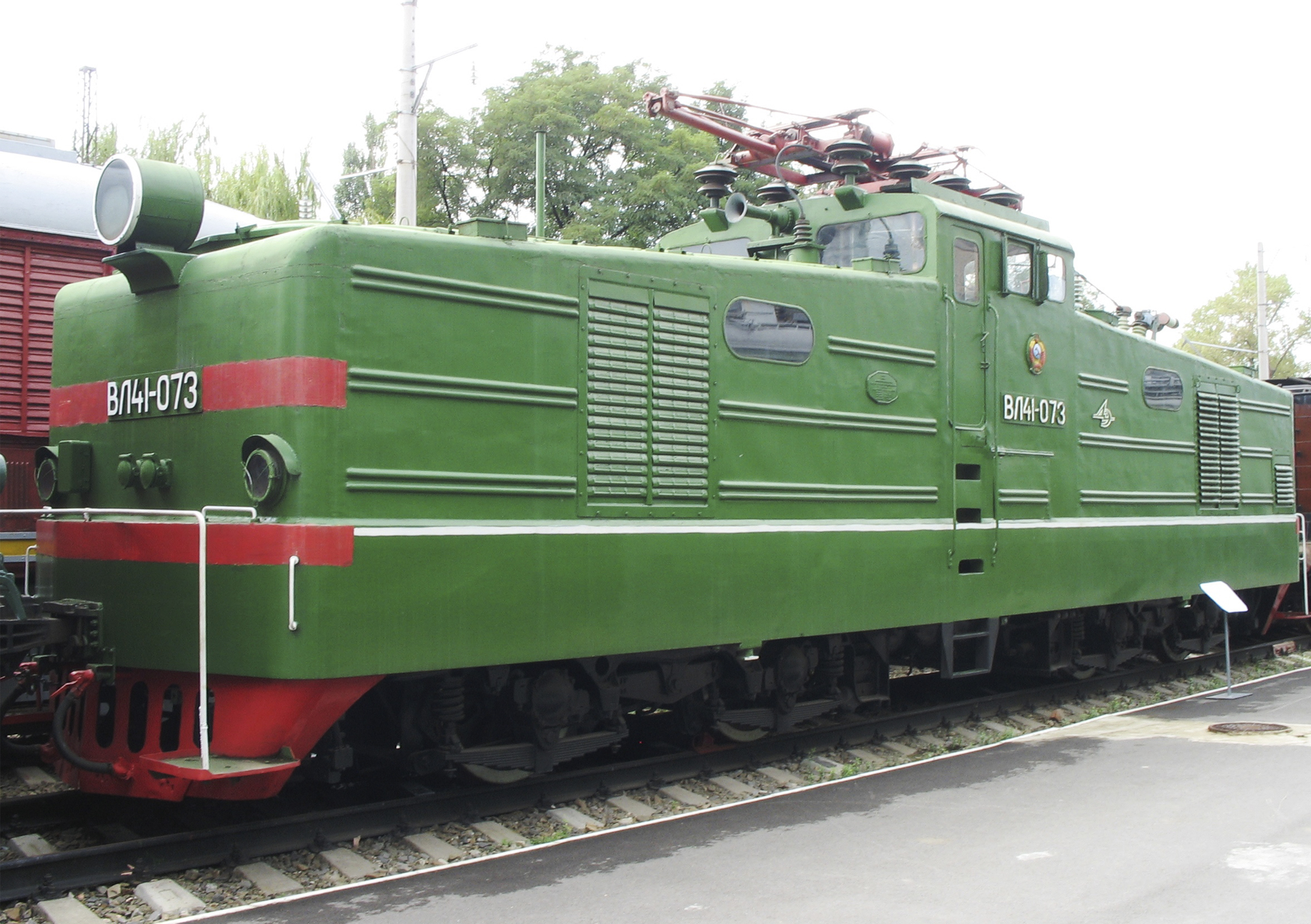 Электровоз построен в 1964 году Днепропетровским электровозостроительным заводом